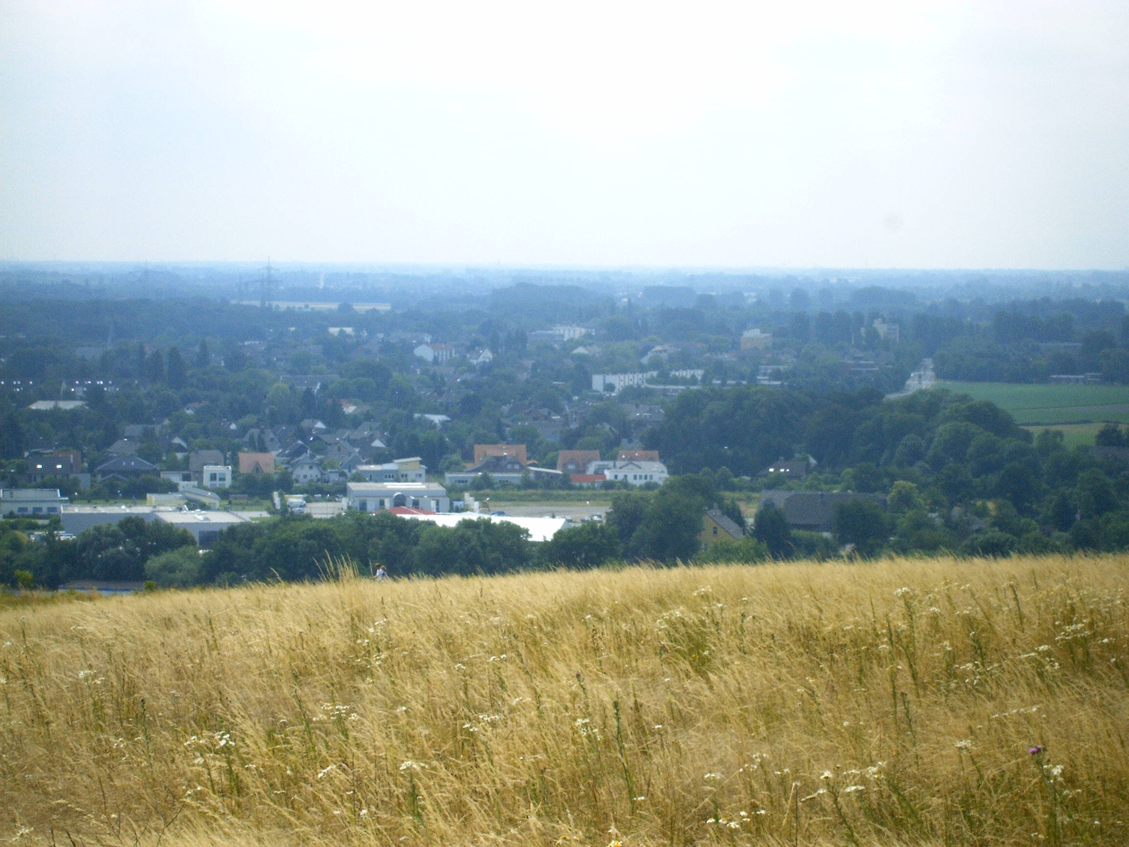 Blick auf den Stadtteil Neukirchen von der Halde Norddeutschland